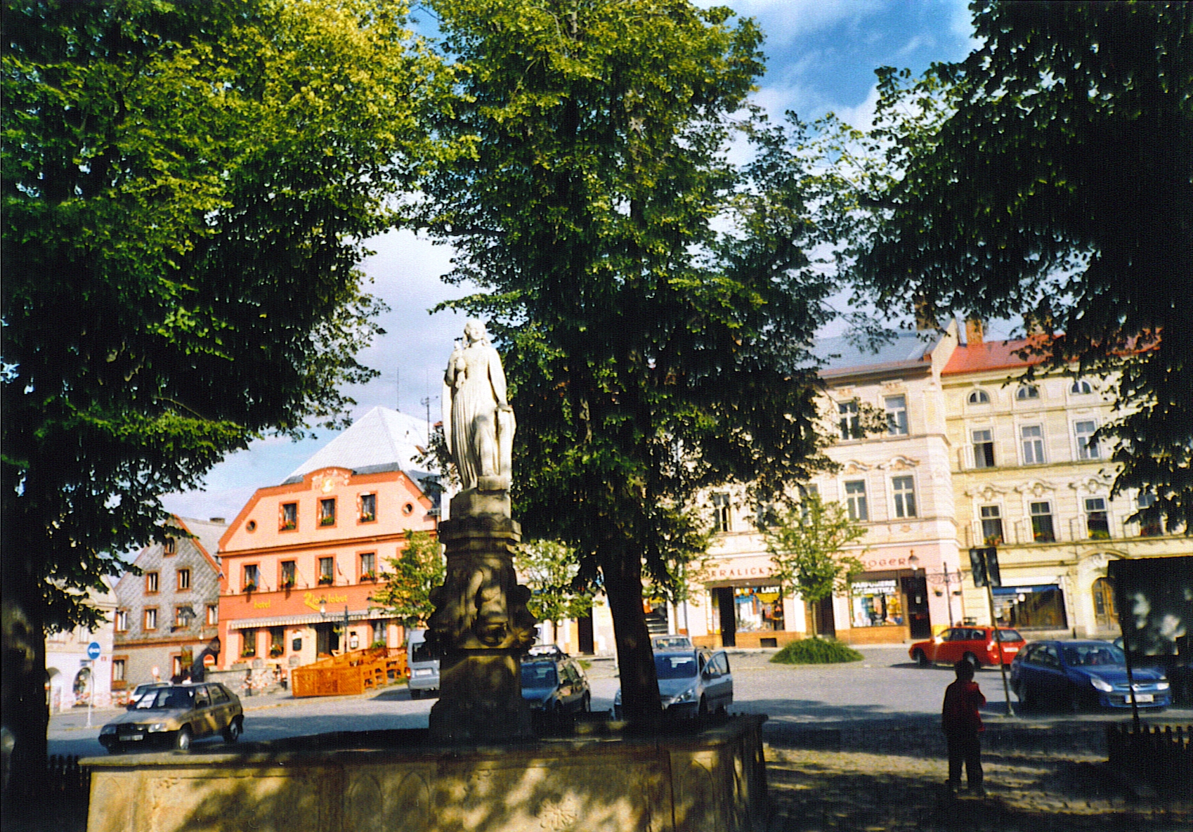 Markt des Ortes Králíky mit Statue